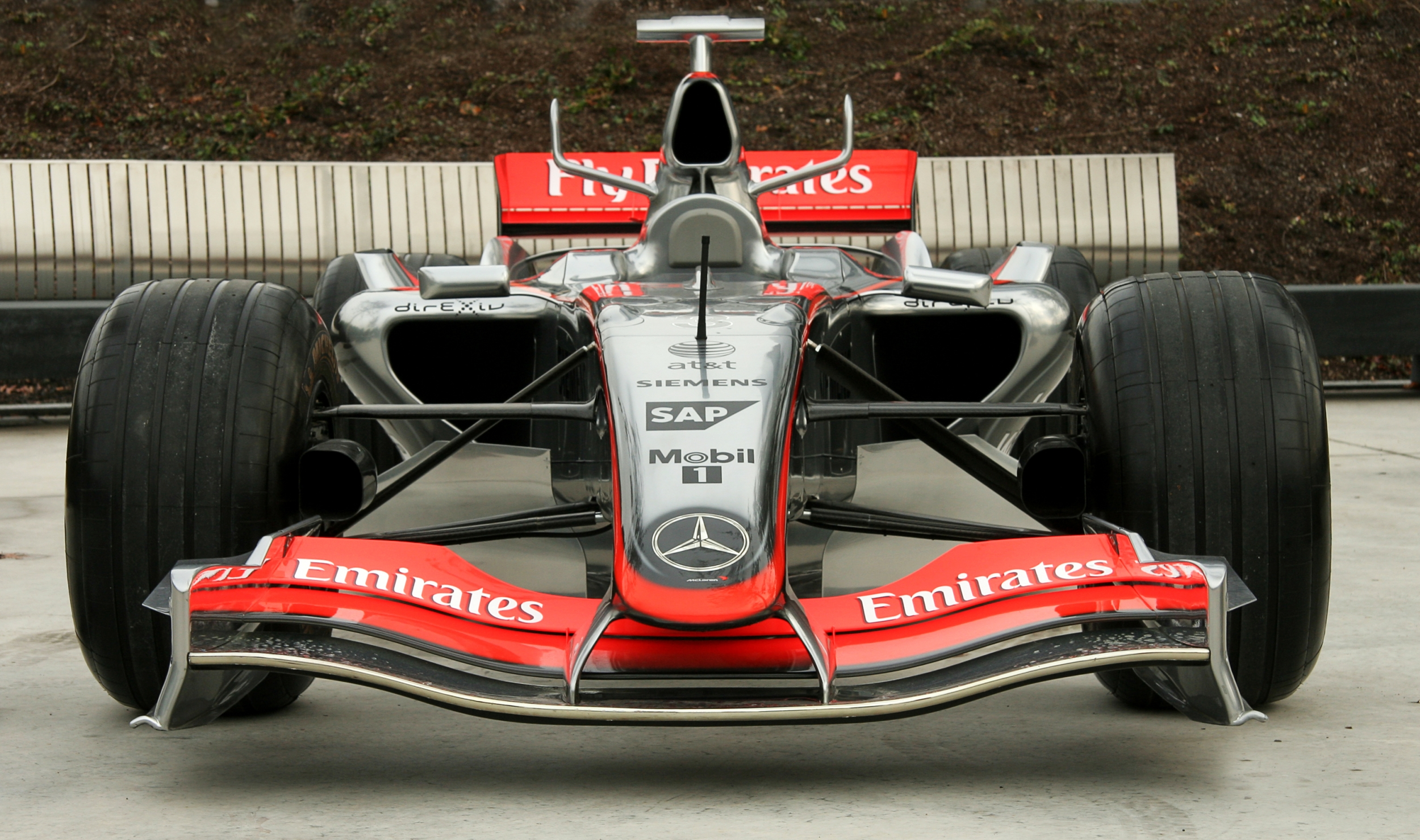 McLaren-Mercedes F1 car 2006